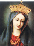 Quadro di "Maria Regina di tutti i Santi" esposto nel Duomo di Ancona